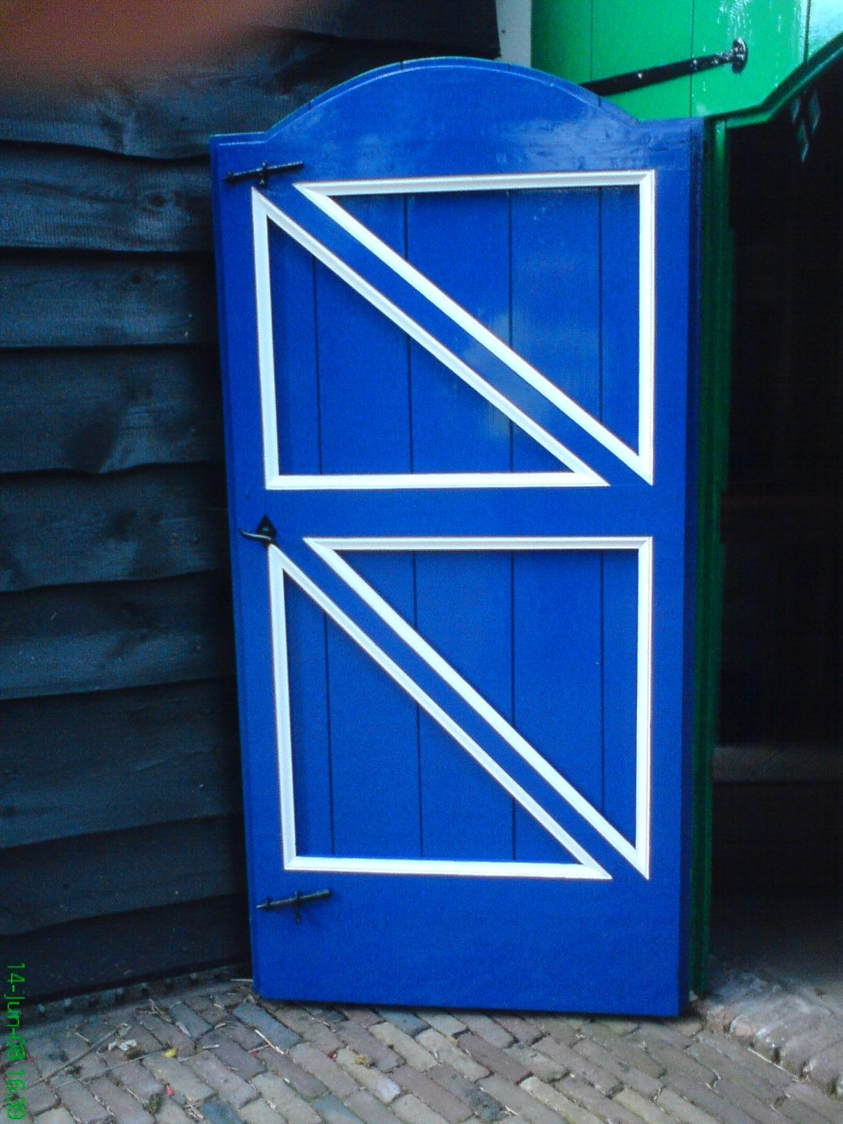 Baanderdeur Staphorst